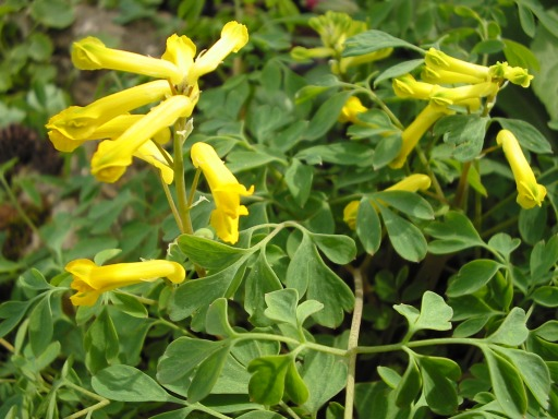 Corydalis lutea, Jardin des Plantes, Paris